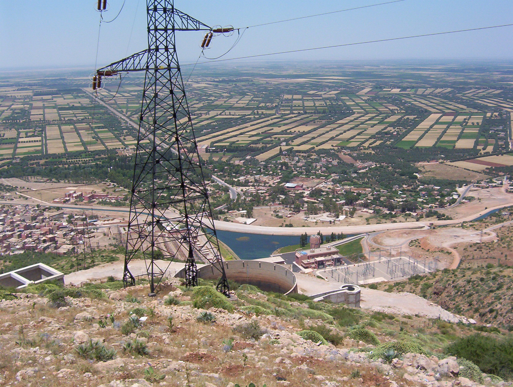 Cette photo a été prise en 2011!